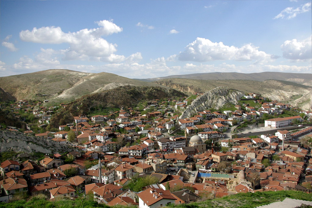 Beypazarı, Ankara